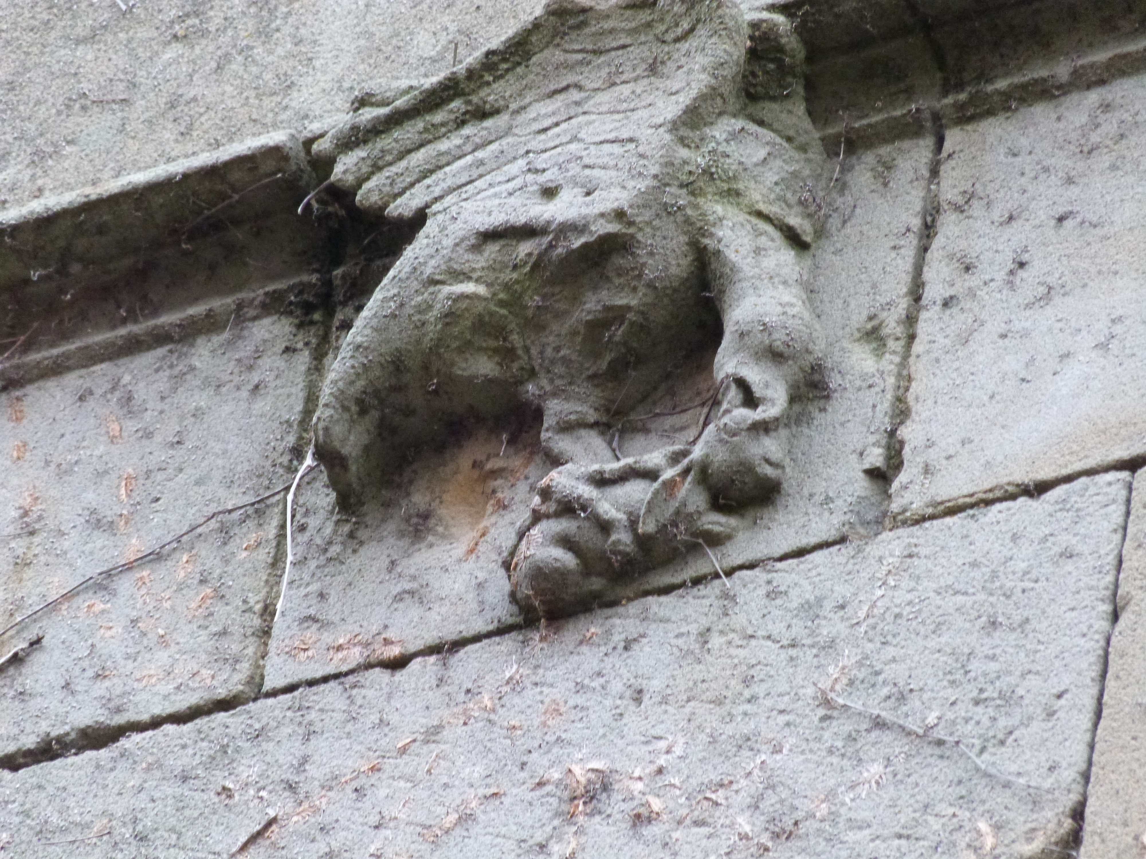 Maison du Grand Écuyer (Classé) .